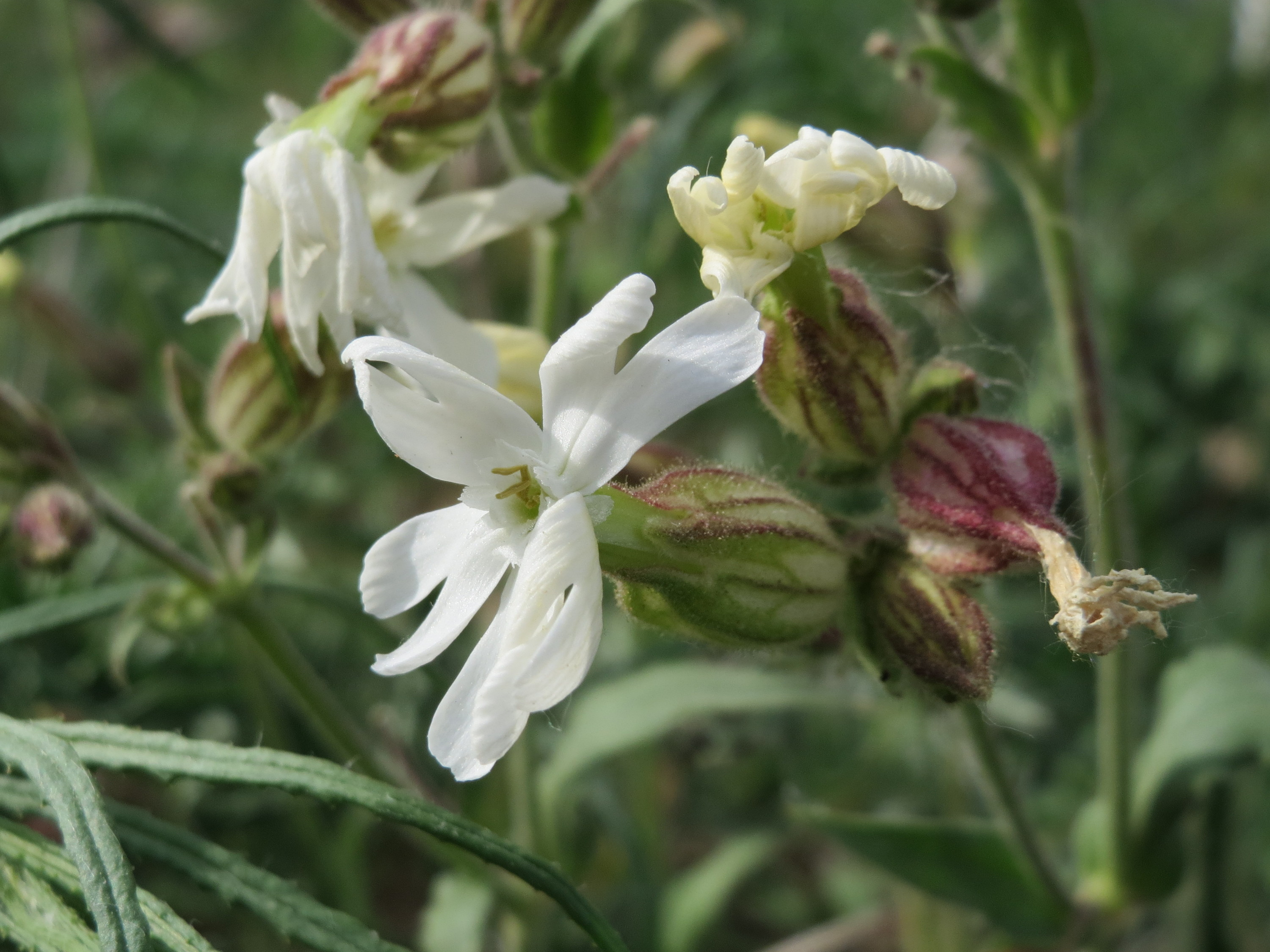 Weiße Lichtnelke (Silene latifolia) in Hockenheim